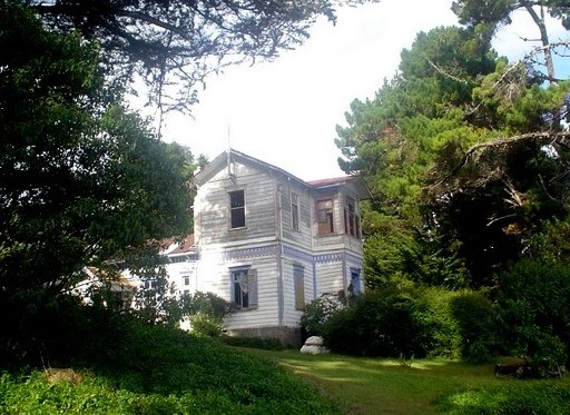 Isla Helvecia o Chaullin ubicada frente a la Isla de Calbuco, Decima Región, Chile. Aquí se encuentra uno de los tres parques de arrayanes mas grandes del mundo.